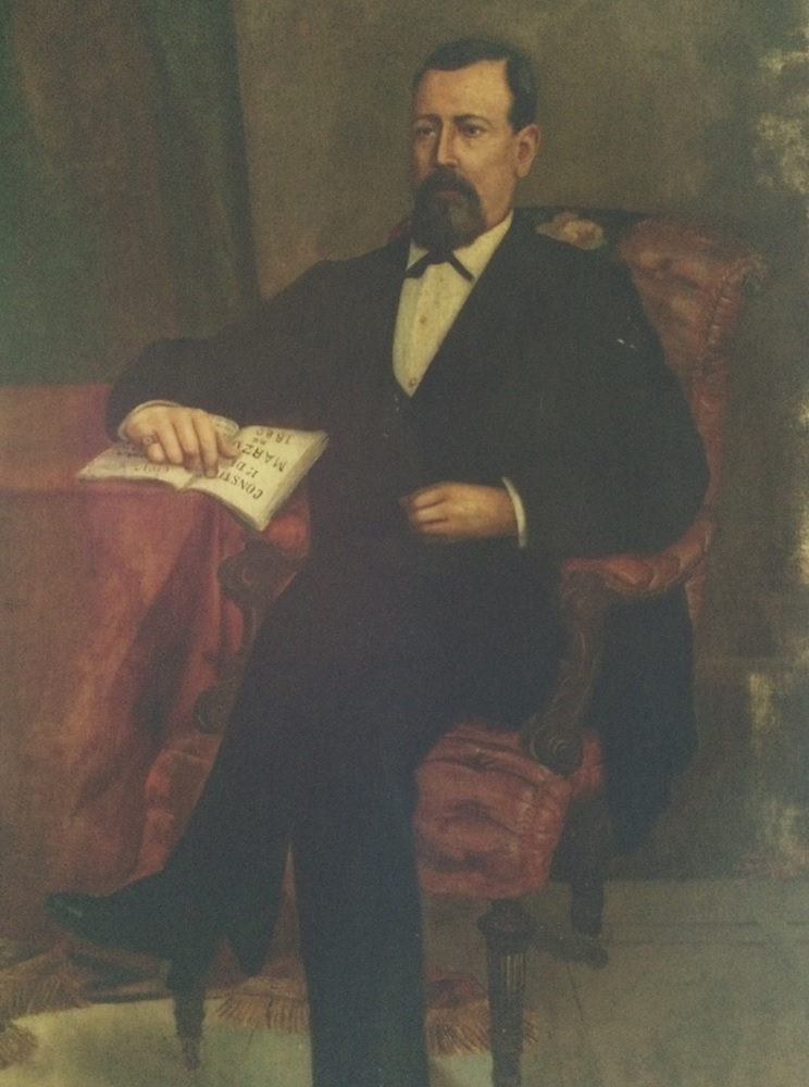 Retrato oficial del Presidente Justo Rufino Barrios